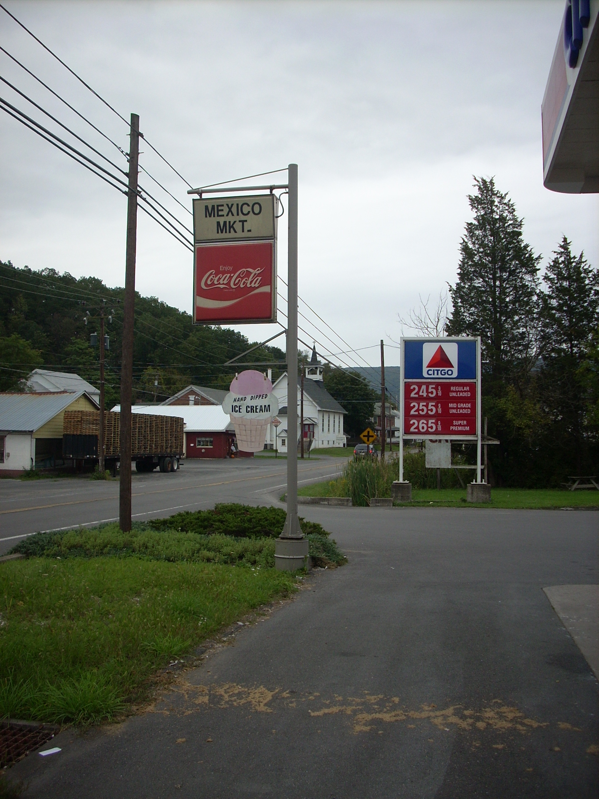 Mexico, Pennsylvania